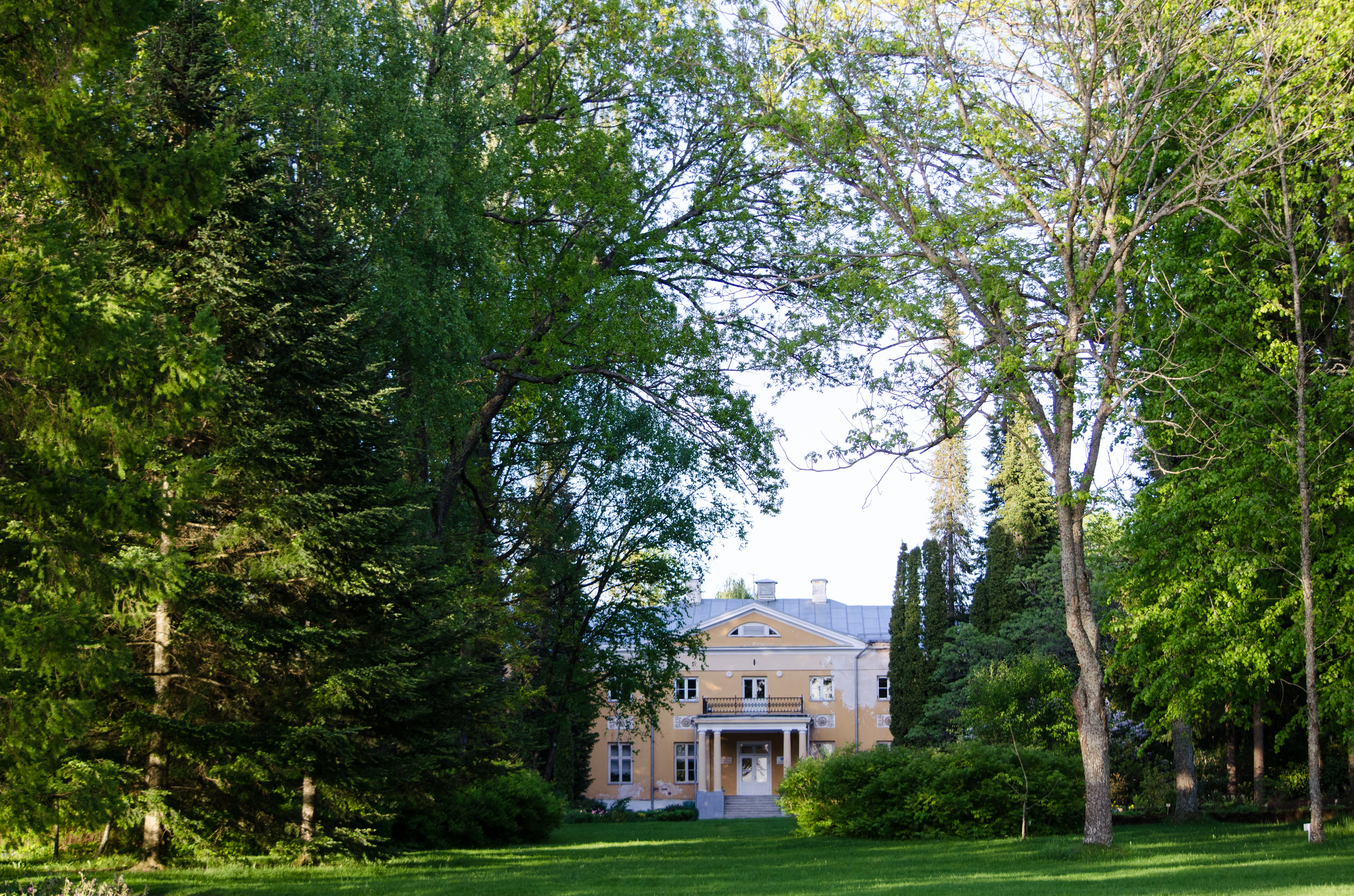 Räpina mõisapark